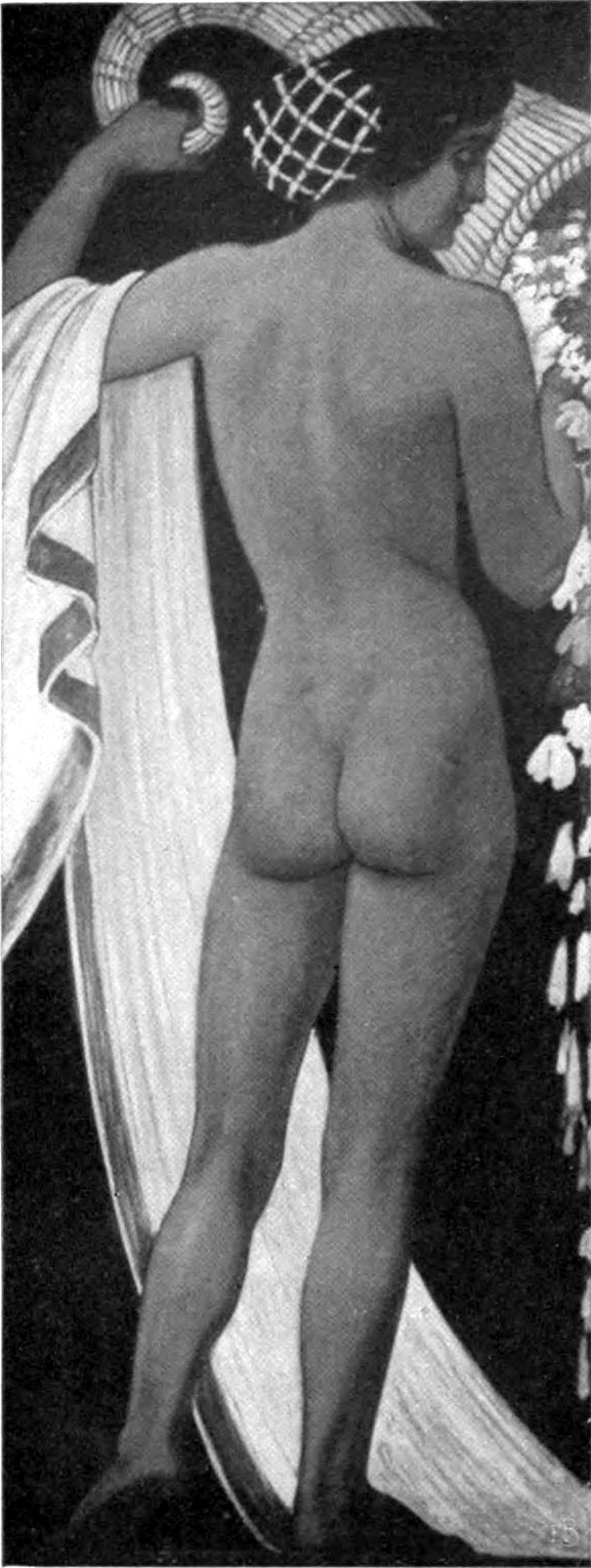 Mutwille, peinture murale, Wiesbaden Residenztheater